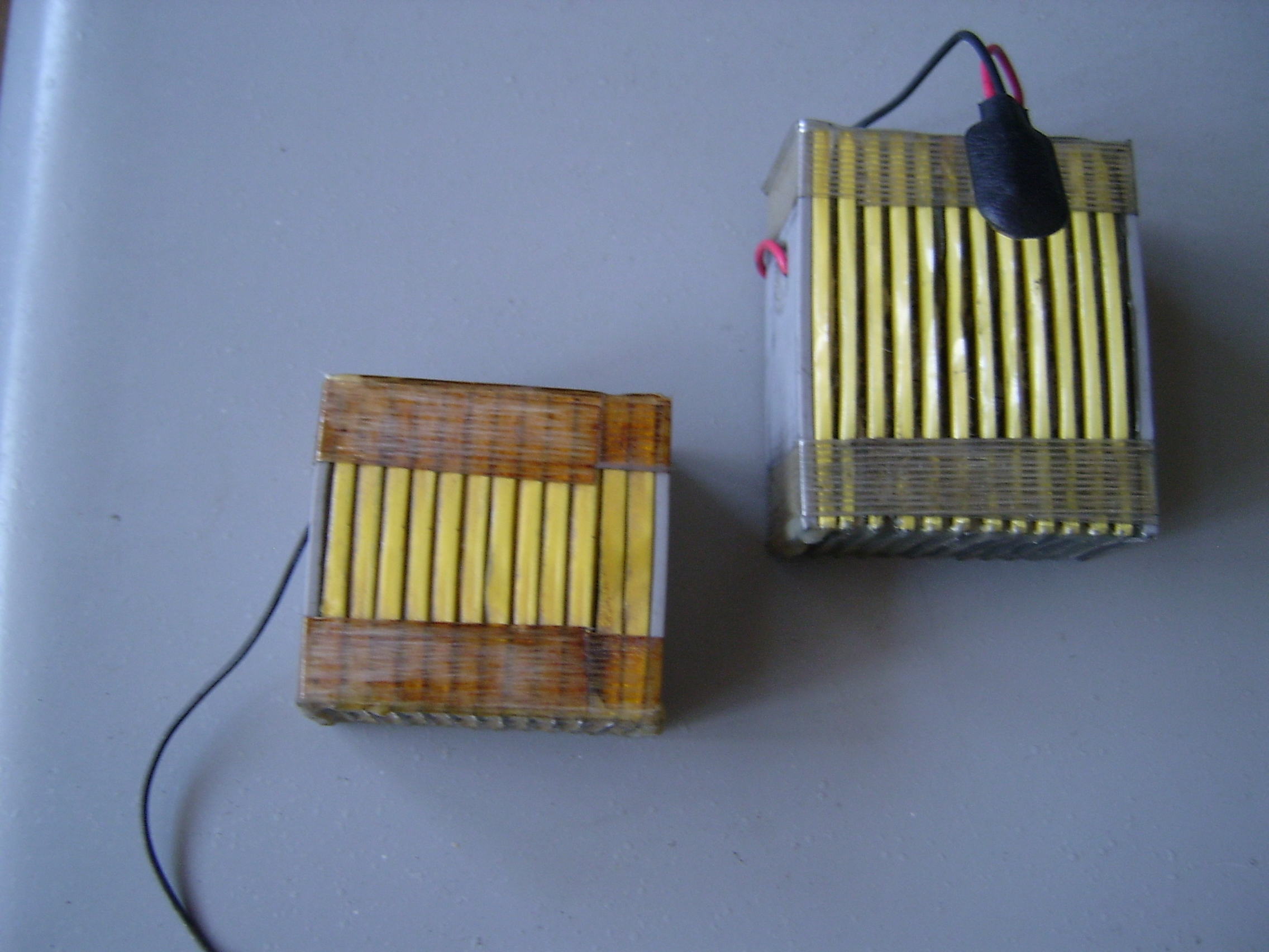 این باتری ها از نوع فعال شونده با آب بوده و برای فعال شدن مدت ۳ دقیقه باید در آب معمولی قرار داده شوند. از این باتری ها برای تغذیه دستگاه رادیوسوند استفاده می شده است. ولتاژ این باتری ها ۱۸ و ۹ ولت بود و در آن از ترکیبات منگنز استفاده می شد